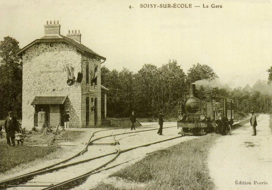 Locomotive Pinguely 130 T n° 6 avec train mixte en gare de Soisy-sur-École.